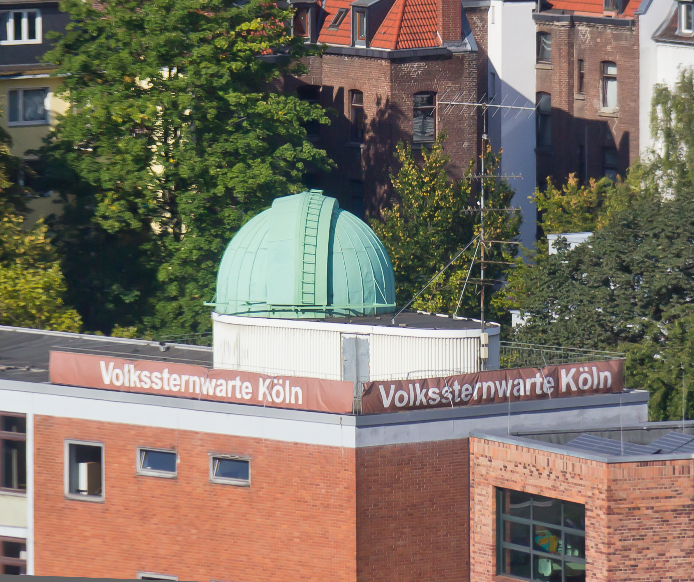 Volkssternwarte Köln, auf dem Dach des Schiller-Gymnasiums, Ansicht vom Hochhaus des Justizzentrums